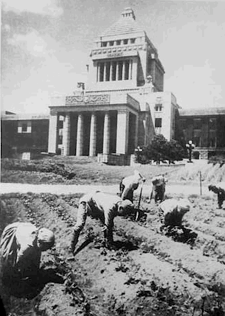 国会議事堂前を耕しサツマイモを植える議会職員。